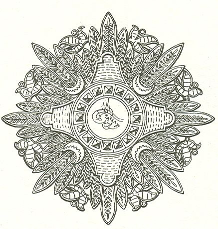 Ster, getekend door Maximilian Gritzner